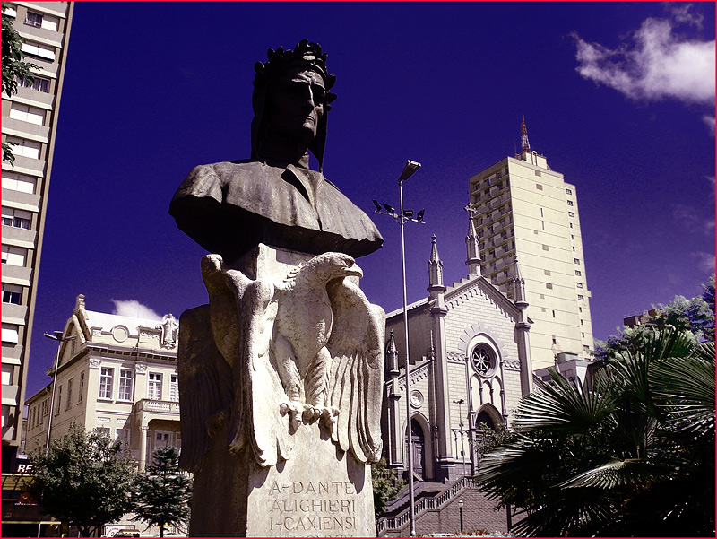 Monumento a Dante Alighieri na Praça de mesmo nome em Caxias do Sul, Brasil. Cores editadas